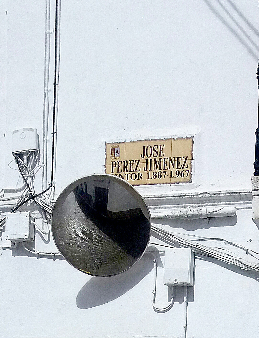 Segura de León (Badajoz). Placa identificativa de la calle José Pérez Jiménez.